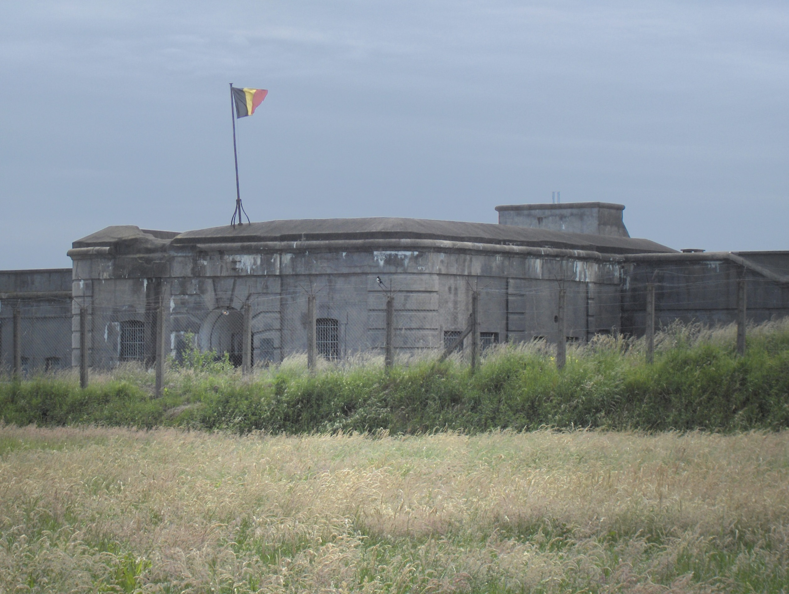 Entrance to the Fort van Breendonk, Belgium